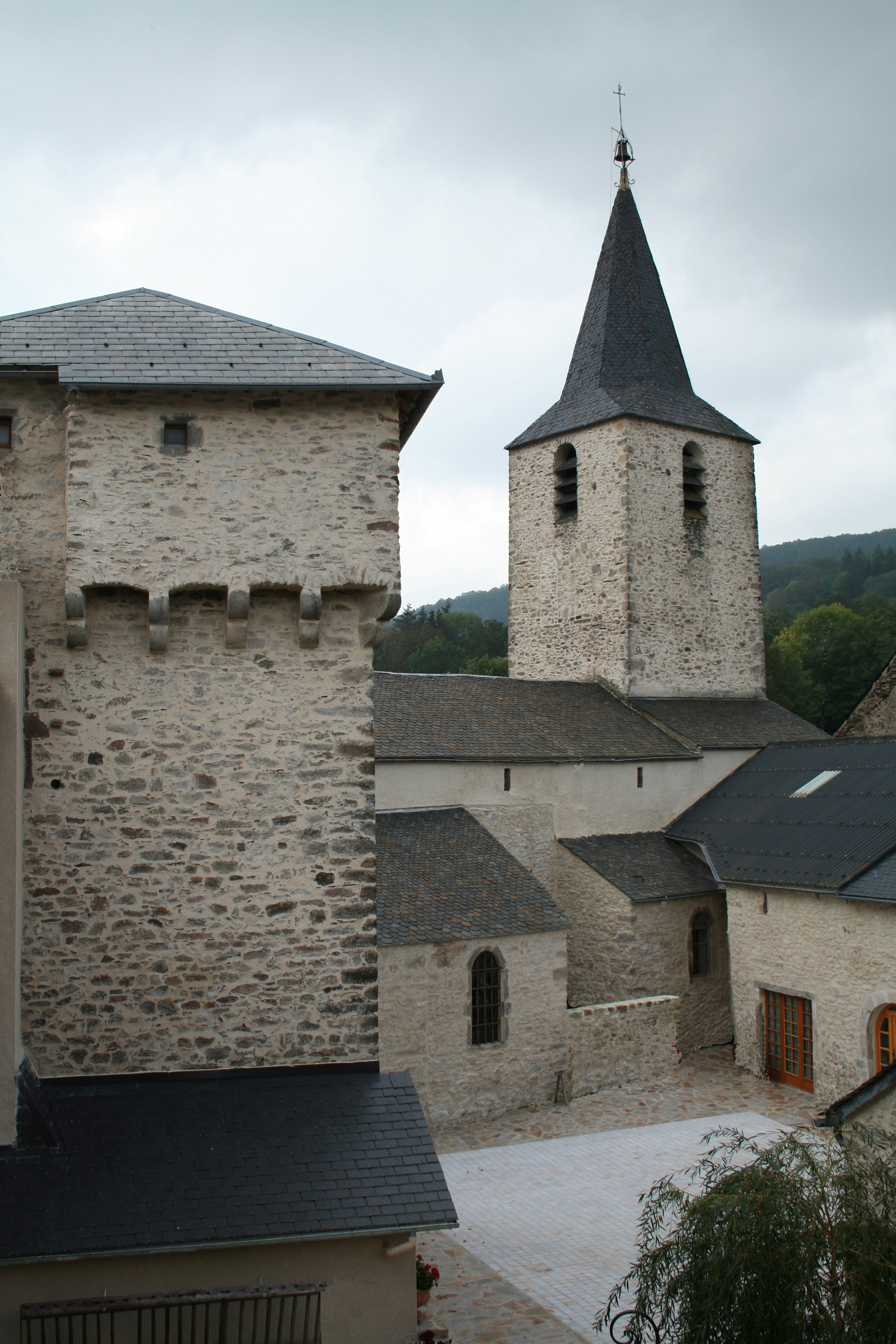 Église paroissiale Saint-Victor de Nages (Tarn)- Tour du château.